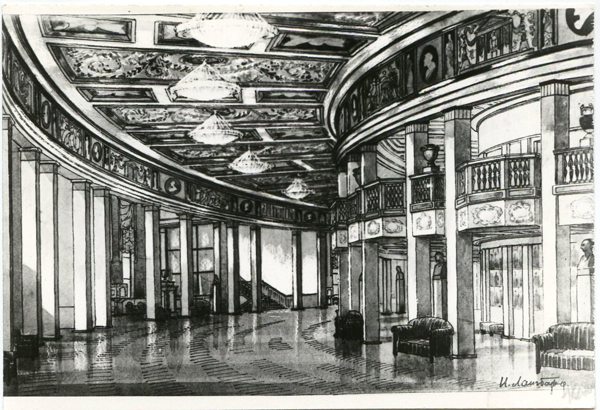 Театр оперы и балета в Минске. Интерьер 2-го этажа (восстановление).